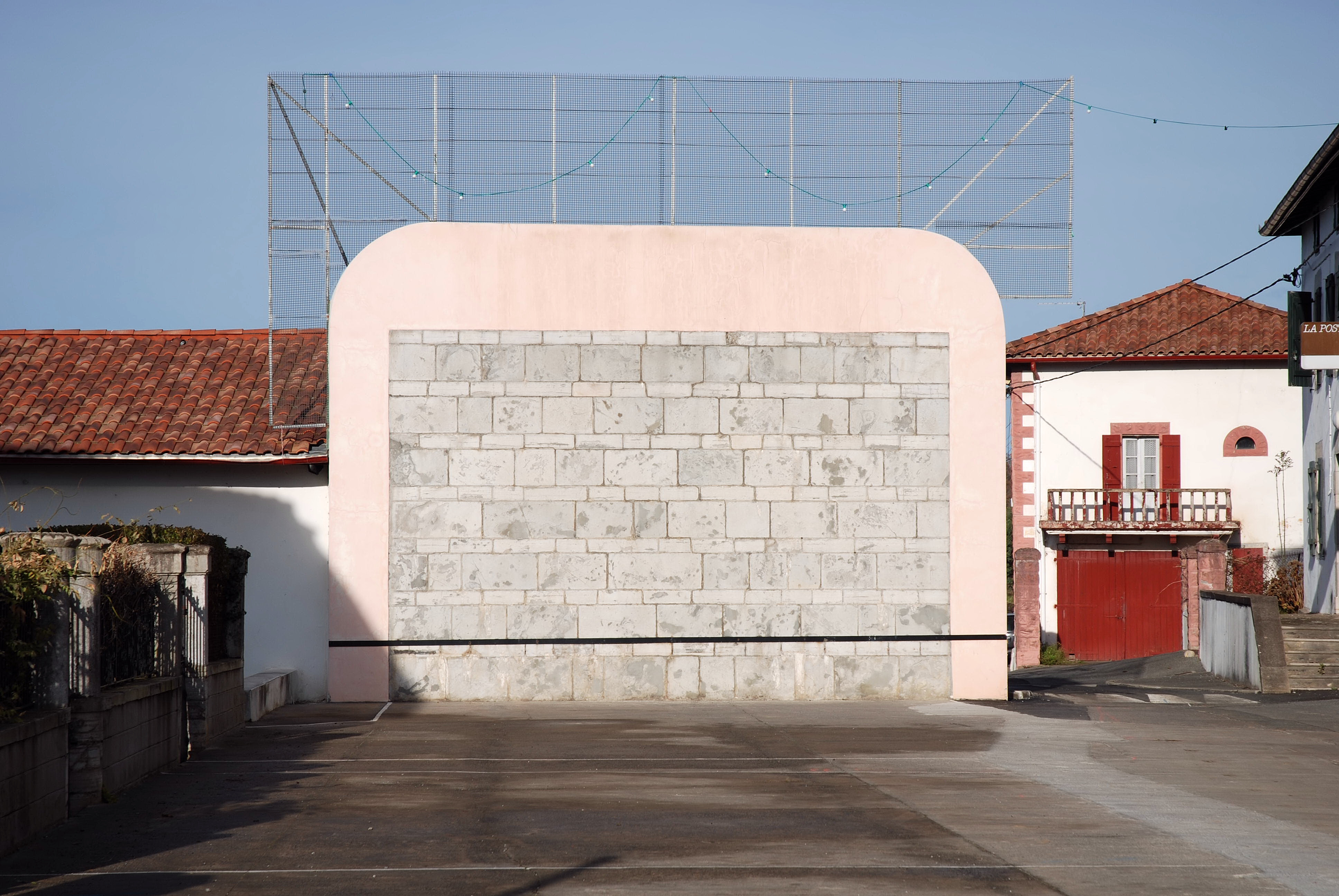 Halsou, le fronton place libre. photo prise le 31/12/06 par Harrieta171